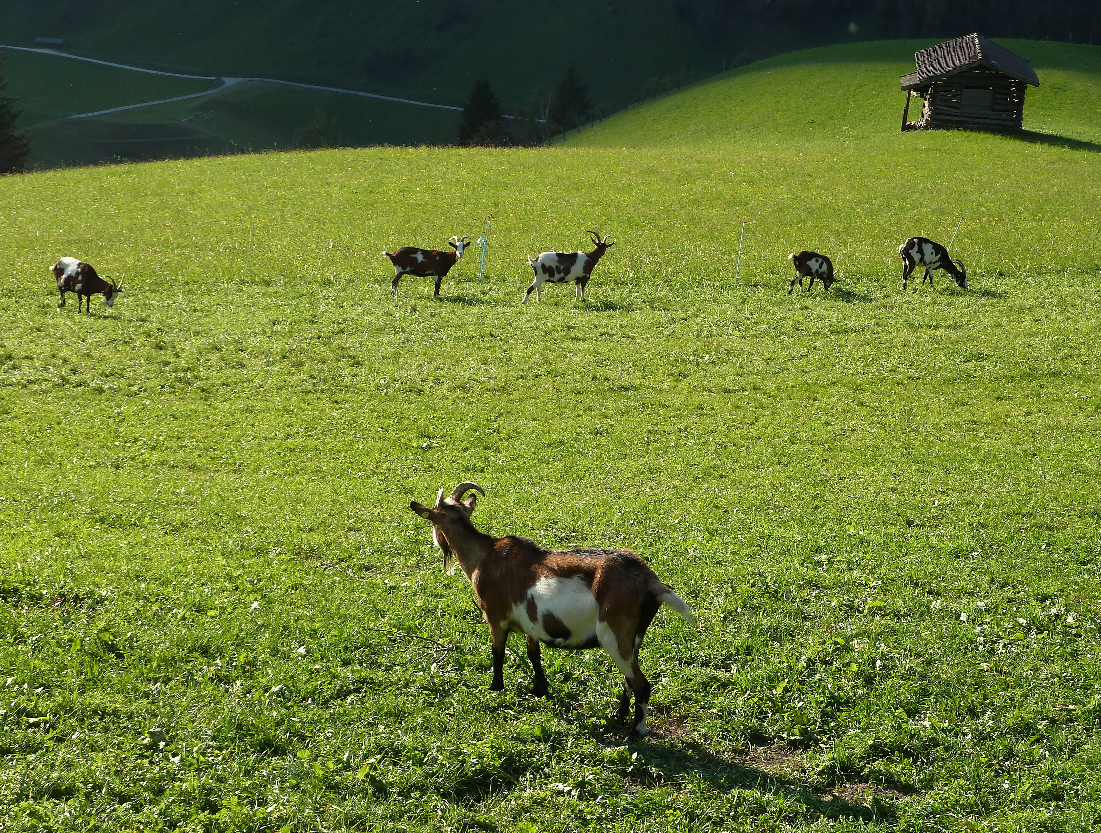 Tauernschecken des Züchters Johann Wallner aus Rauris, der diese in den Hohen Tauern heimische Ziegenrasse im letzten Augenblick vor dem Aussterben bewahrt hat.